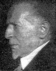 Domenico Ciampoli (1852-1929), scrittore e slavista italiano